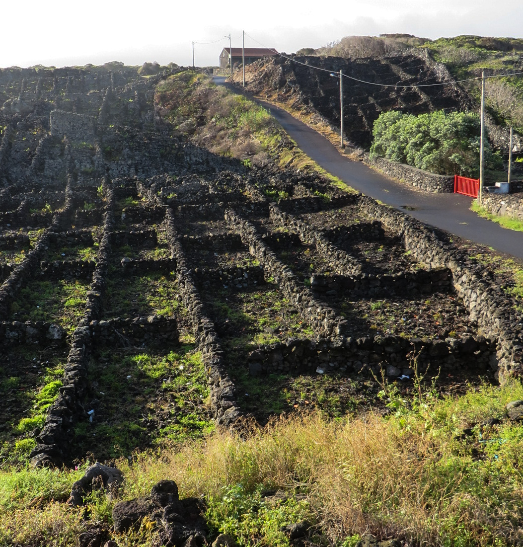 Typische rechteckige Schutzmauern aus Basaltsteinen im Westen der Insel Pico nahe Criaçao Velha auf den Azoren.